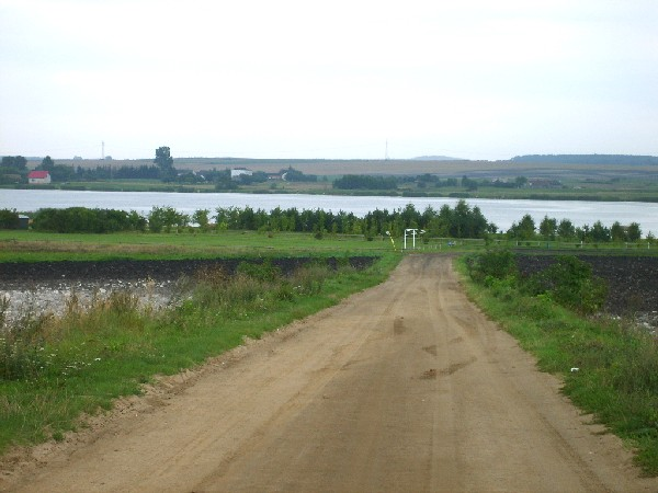 zalew Żółtańce.